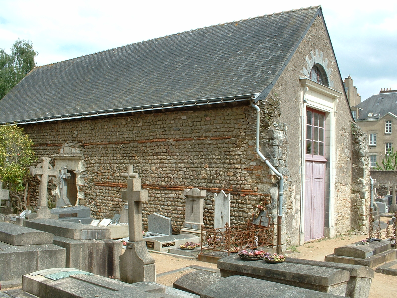 Nantes - Cimetière Saint-Donatien - Chapelle Saint-Etienne